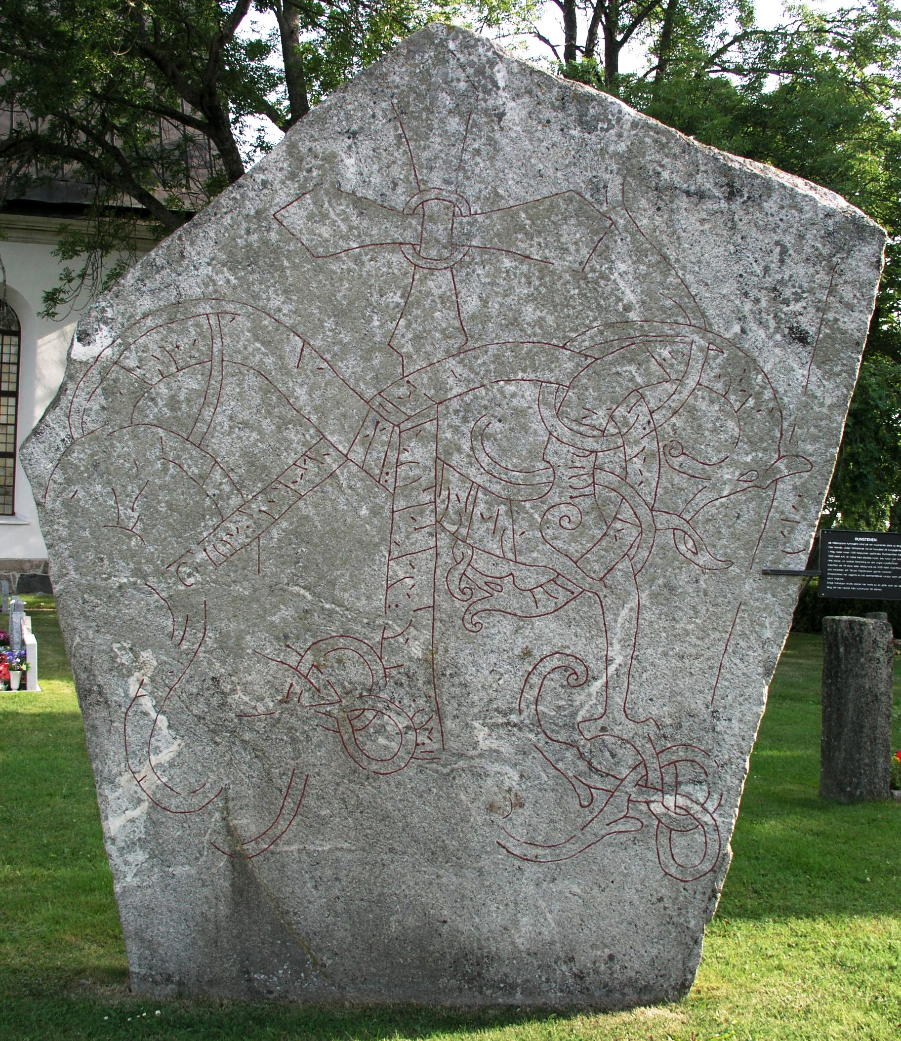 Hälsingtuna church, Runestone, Hudiksvalls kommun, Hudiksvall.